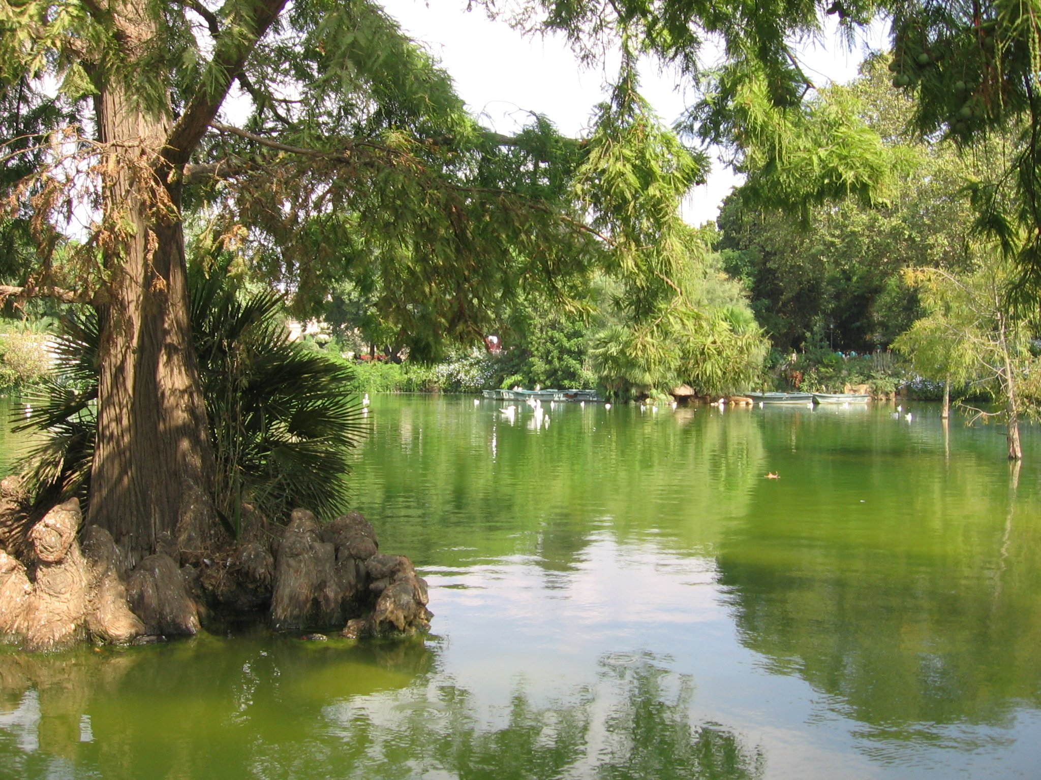 Lago del Parque de la Ciudadela.